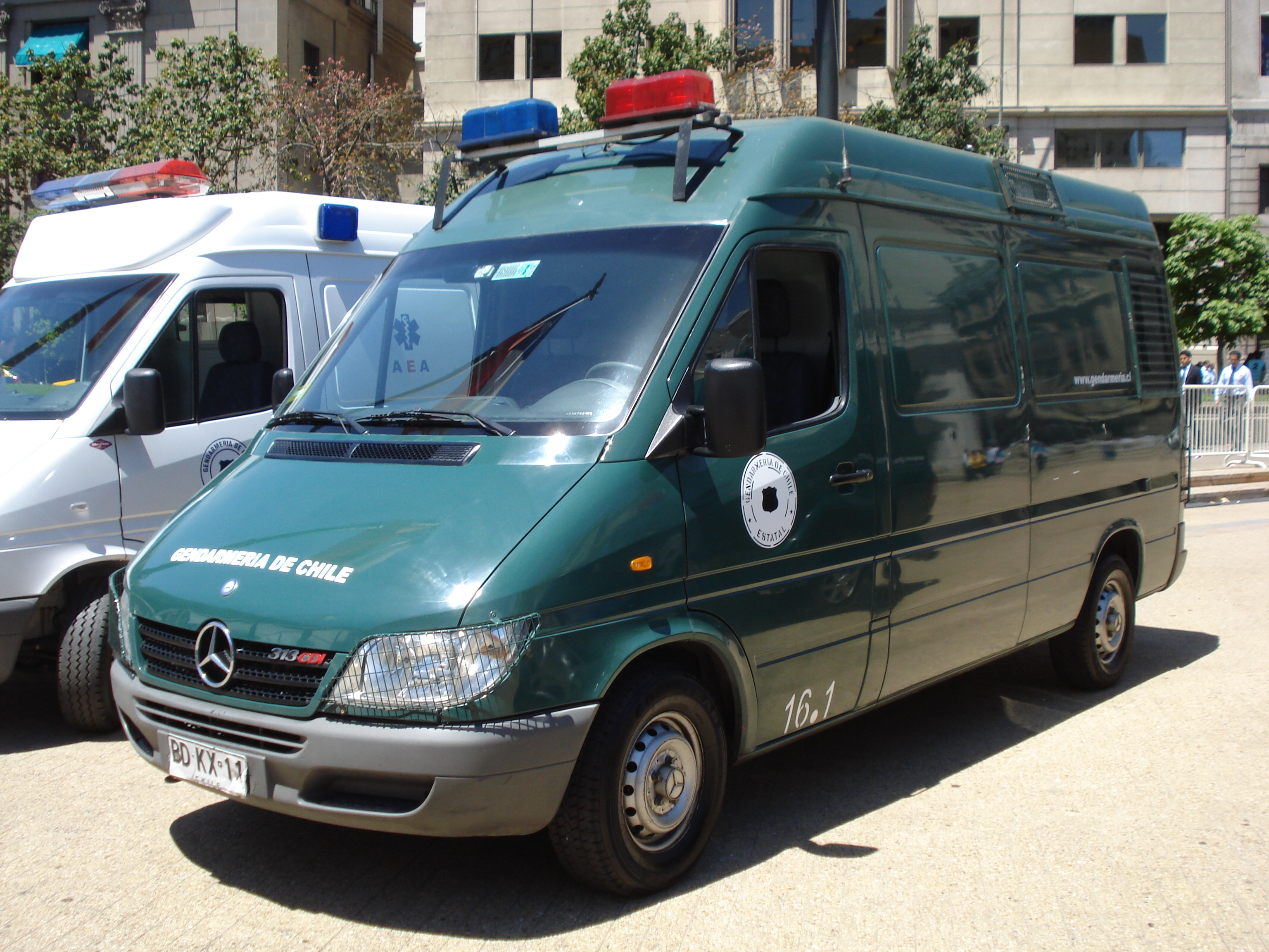 Carro celular, para traslado de privados de libertad utilizado en la actualidad por de Gendarmeria de Chile.